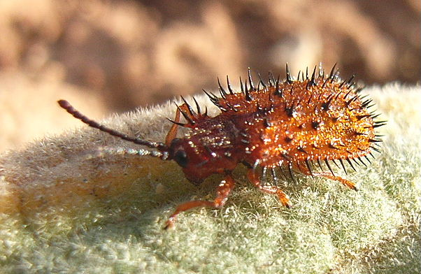 Dicladispa testacea from Spain